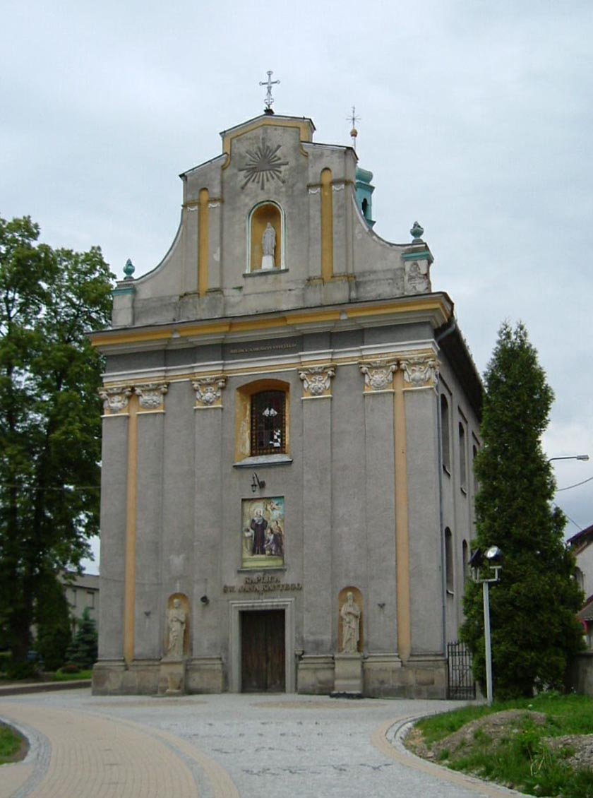 Kęty lengyel város barokk temploma